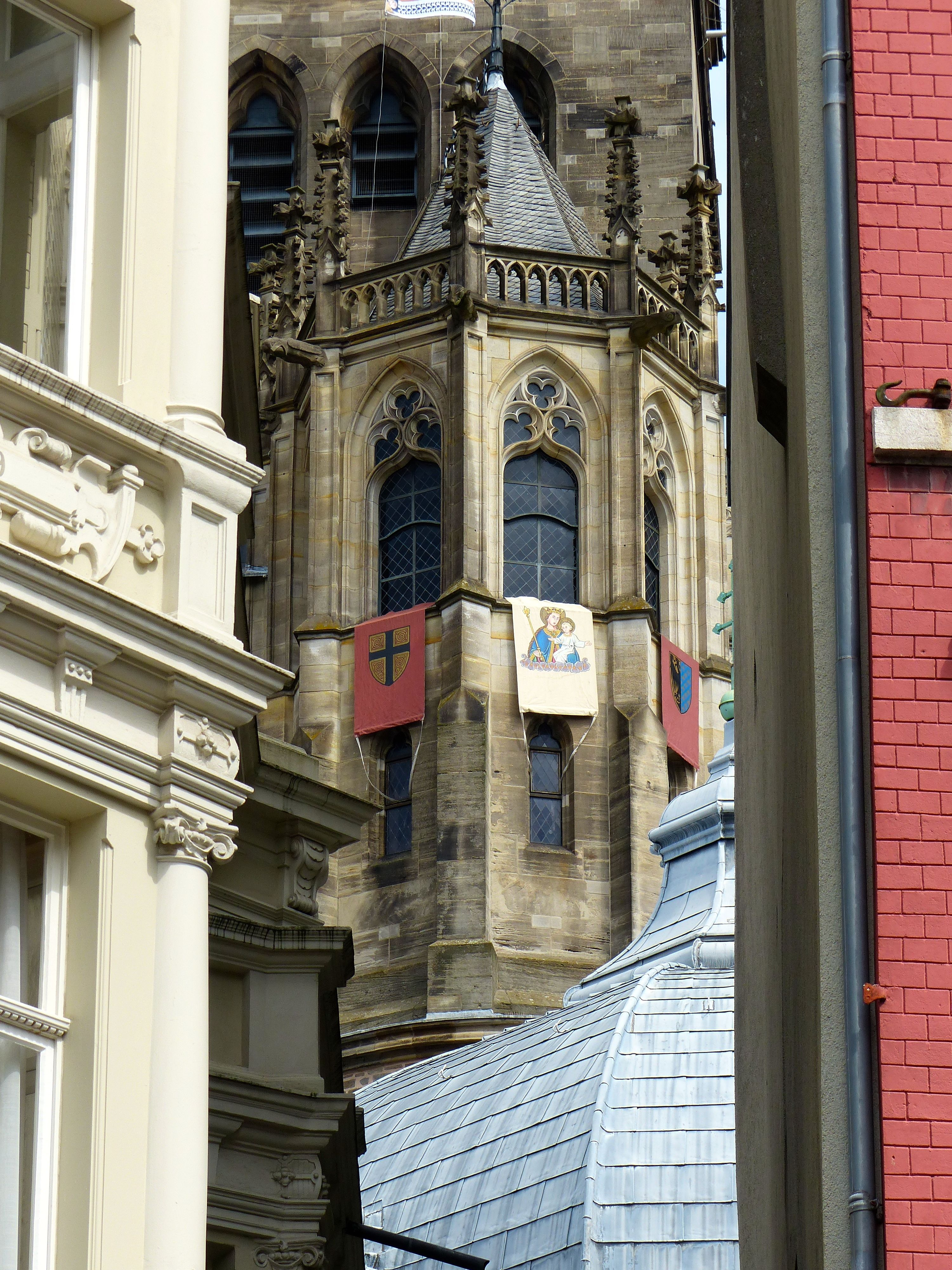 Aachener Dom: Fahnenschmuck zur Aachener Heiligtumsfahrt 2014